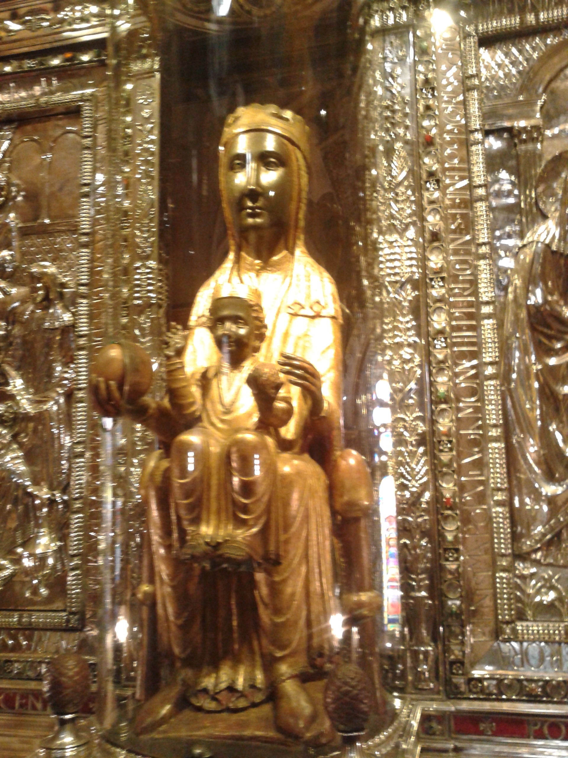 Մոնսերրատի աբբայության Սուրբ Մարիամ արձանը